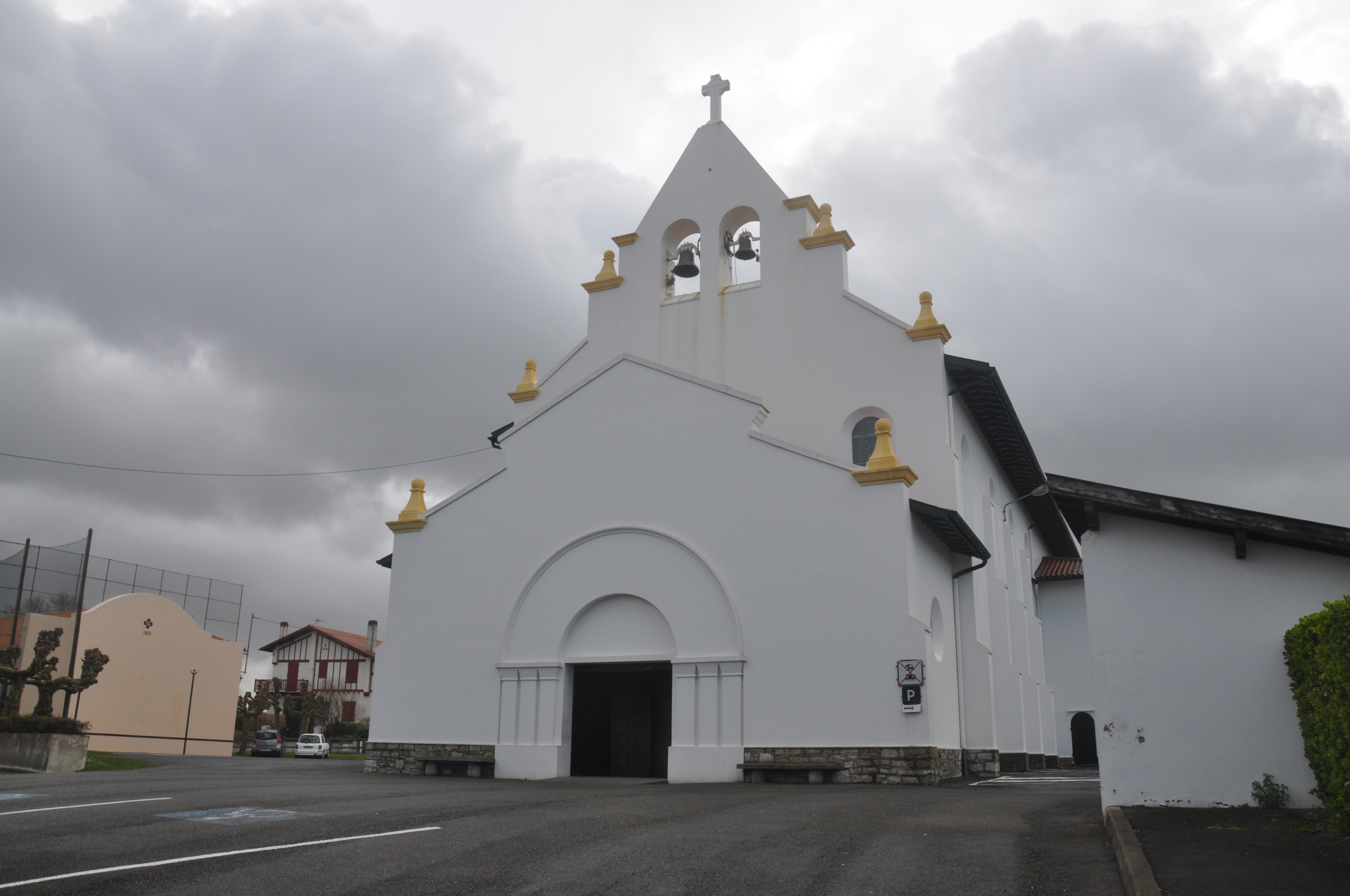 Eglise Sainte-Marie - ANGLET